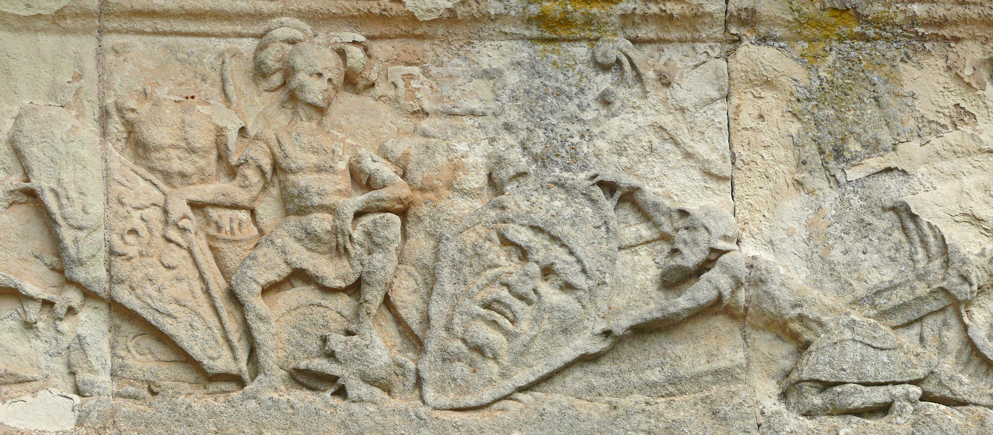 Assier - Frise sculptée de l'église Saint-Pierre - Général victorieux assis sur une seda majestatis un pied sur un casque recevant les trophées arrachés aux vaincus